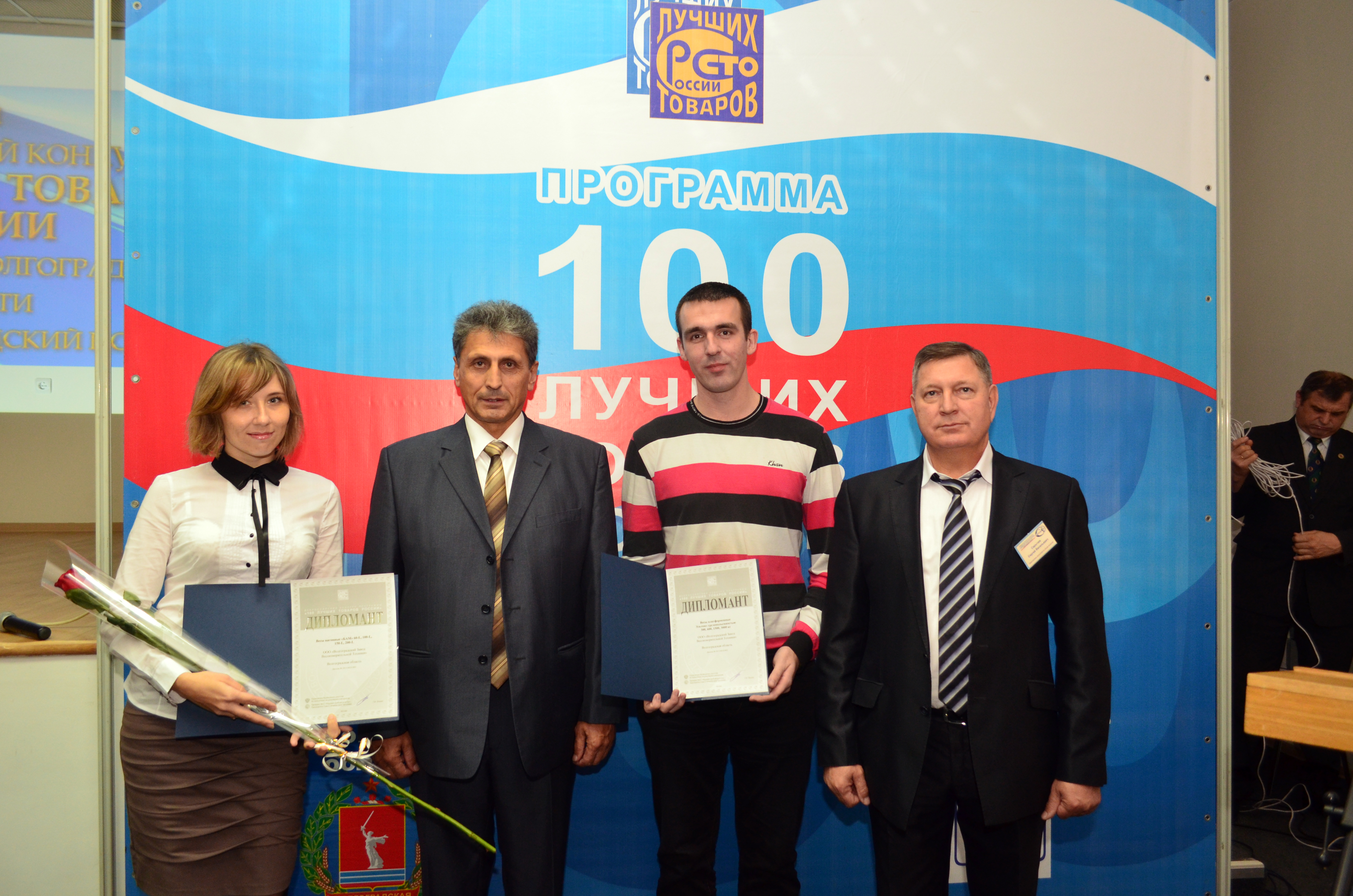 Truck scales «VAL», Railroad scales «BAM», platform scales «Elton» included in the list «100 best goods of Russia»